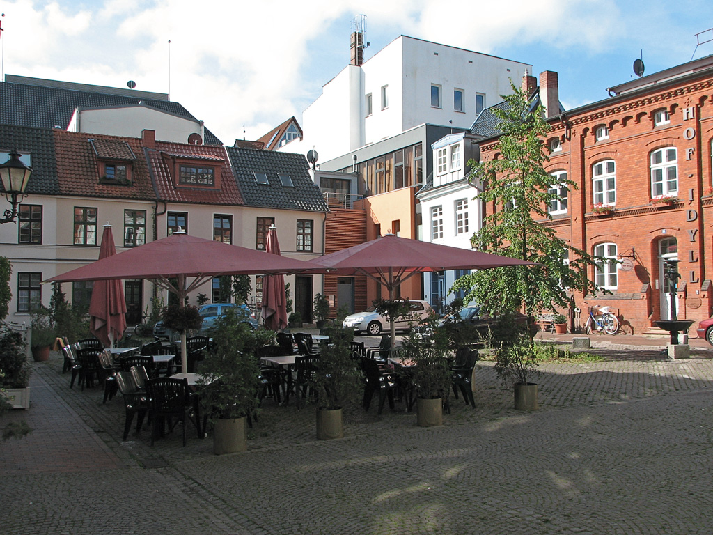 Beschreibung: Heiligengeisthof in Rostock / Germany Fotograf: Darkone, 17. August 2005